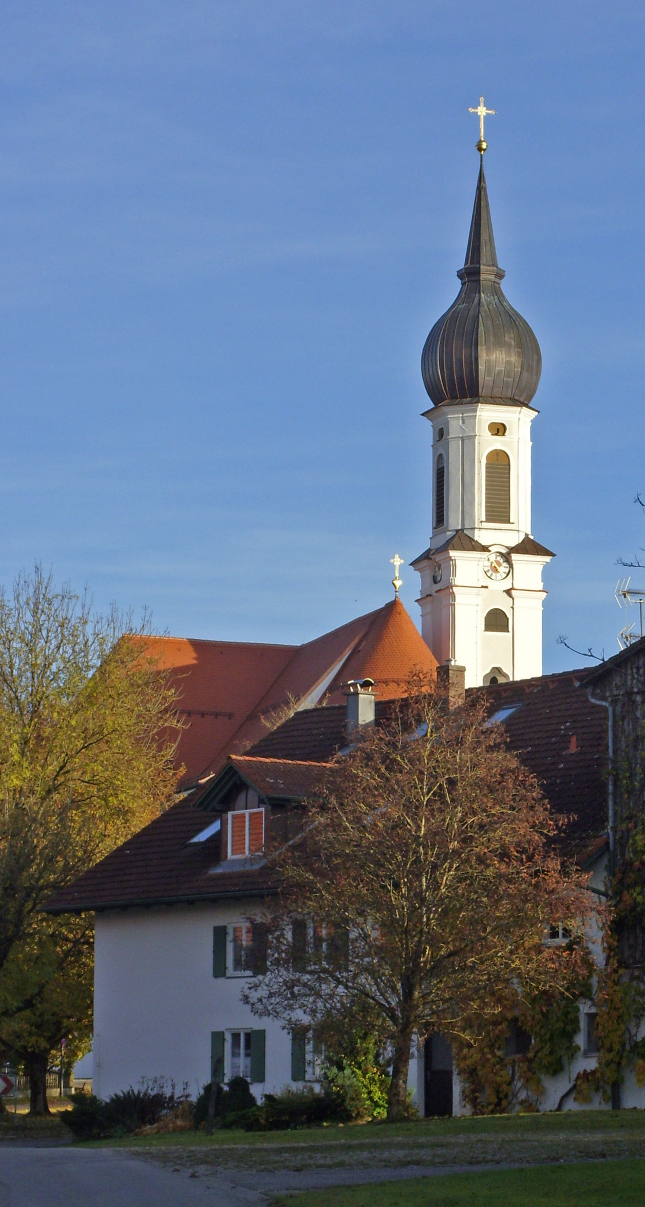 Wallfahrtskirche Vilgertshofen von Westen